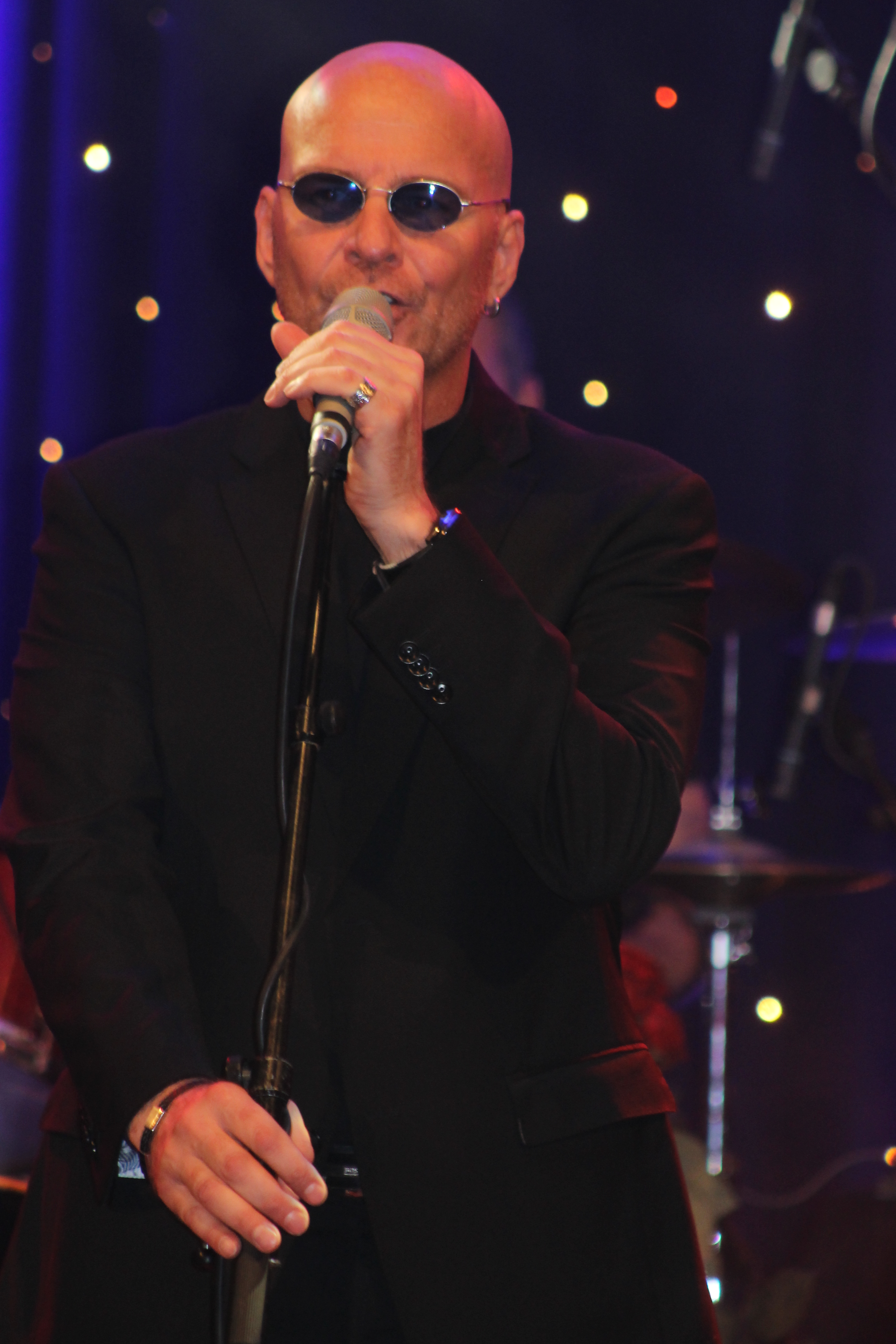 Fanco Leon Südbahnhof Ffm 1 28.4.13